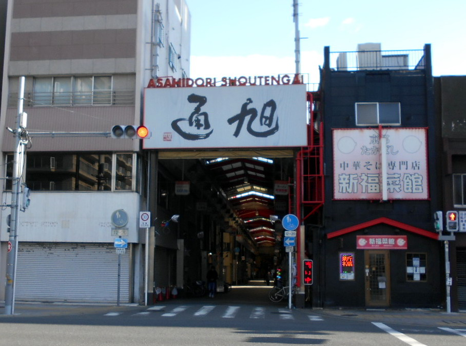 守口市の旭通商店街